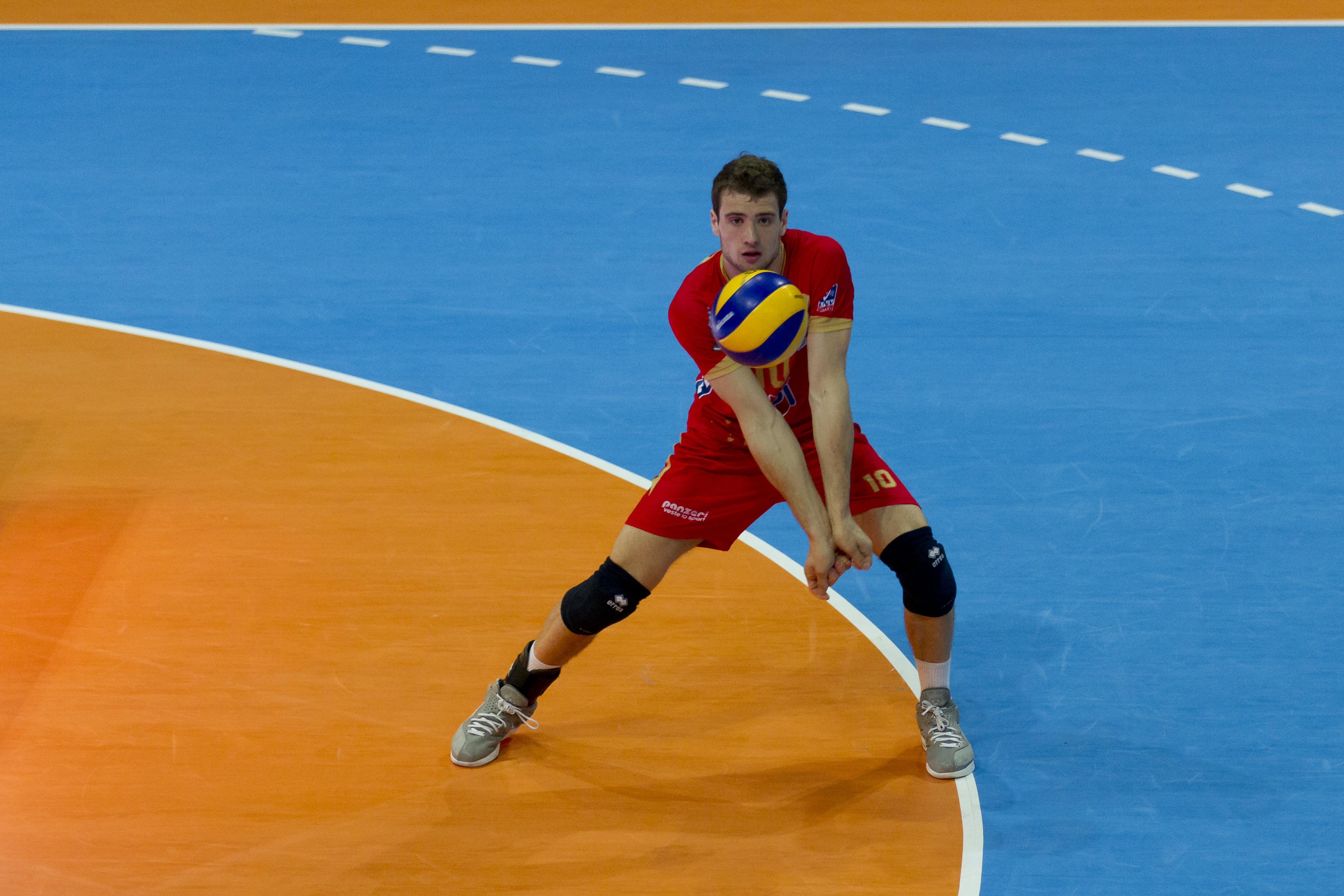 Volleybally - Ligue A - Rencontre du 20 mars 2012 entre les Spacer's de Toulouse et Rennes. Les Spacer's l'emporte 3 à 1